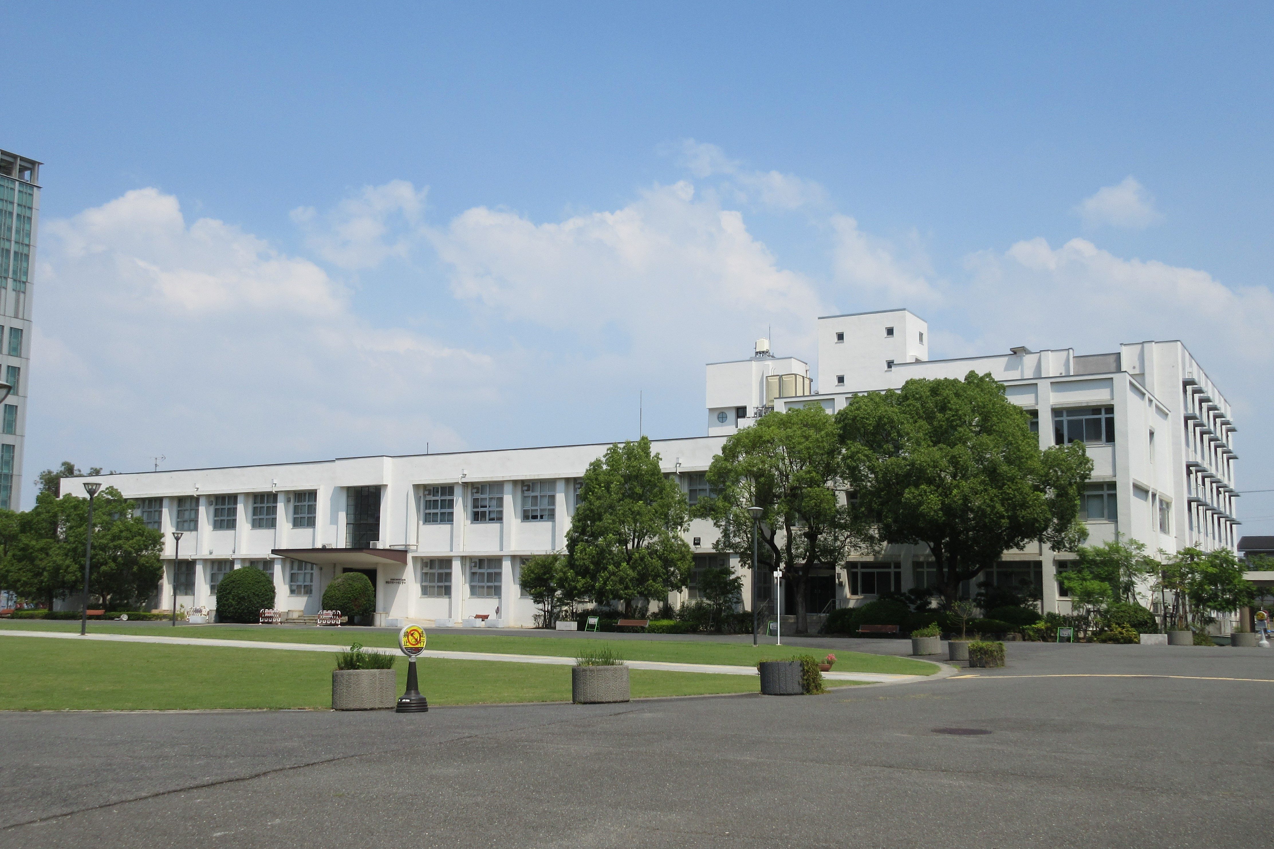 大阪市立大学学生支援センター